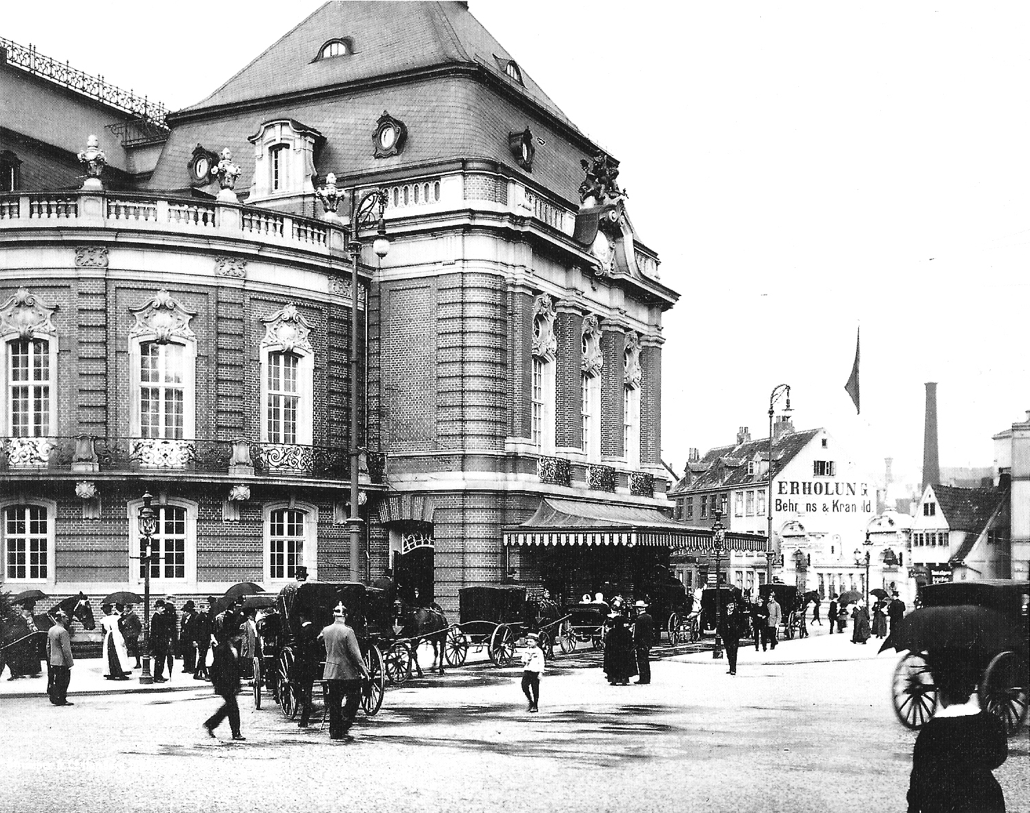 Die Laeiszhalle in der Hamburger Neustadt am 4. Juni 1908, dem Tag ihrer Eröffnung.